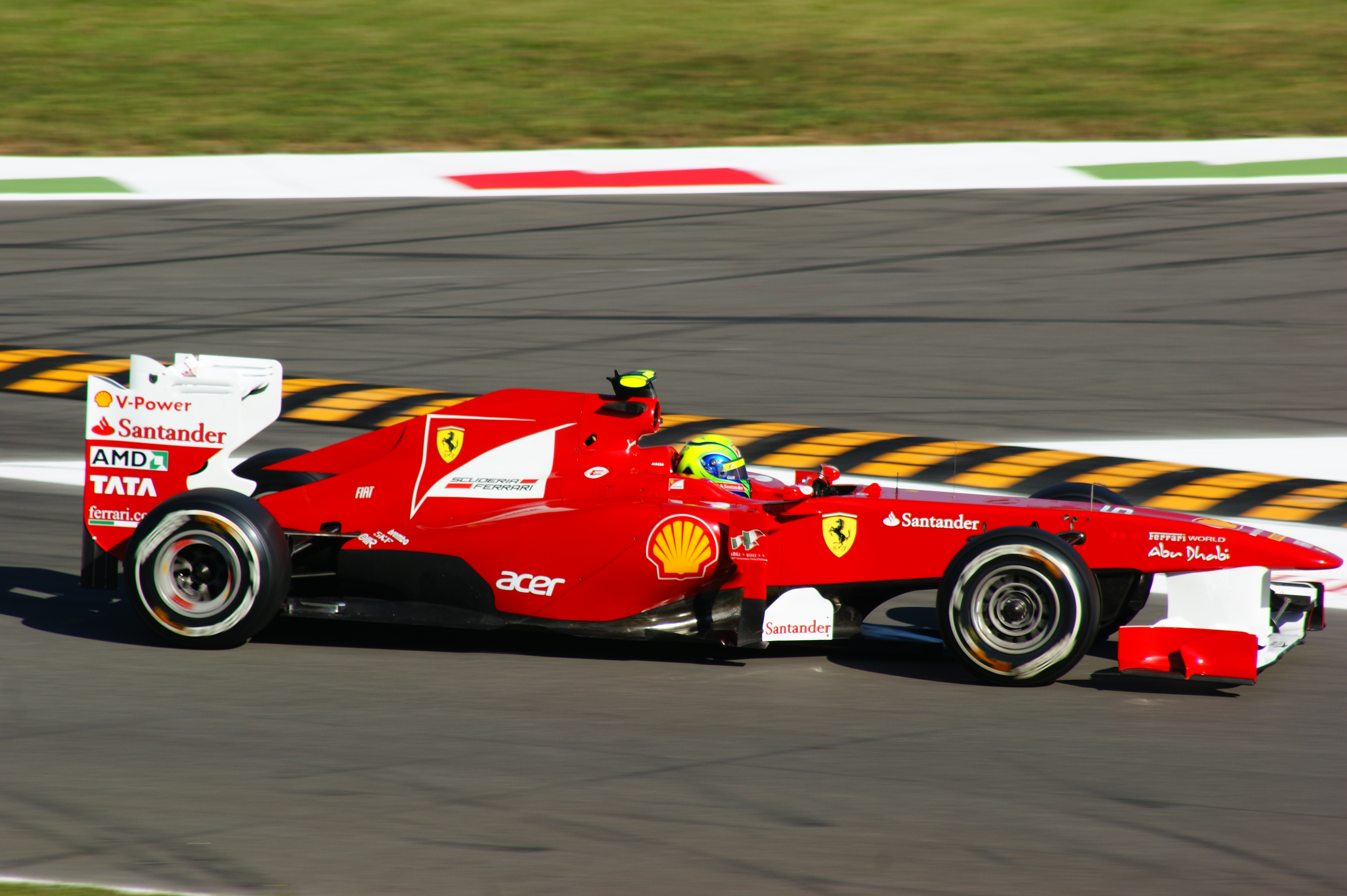 Felipe Massa alla prima variante Monza 2011